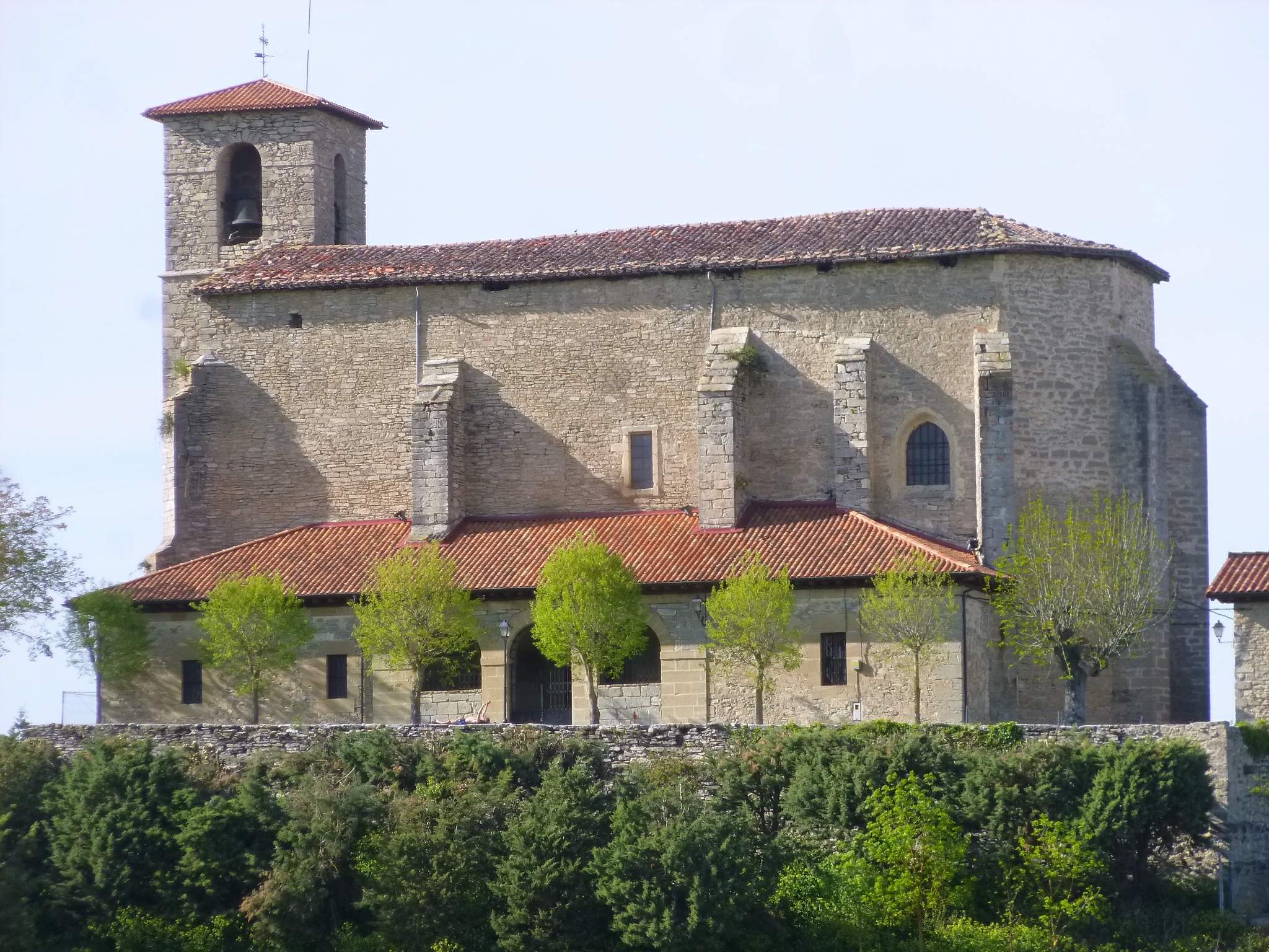 Mendoza - Iglesia de San Esteban